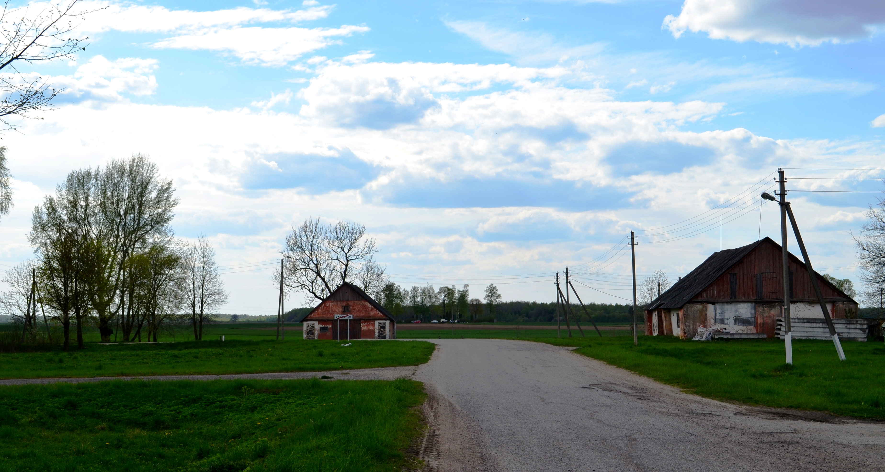 Dvaro statinių liekanos, Vaiškonių k., Kėdainių raj.